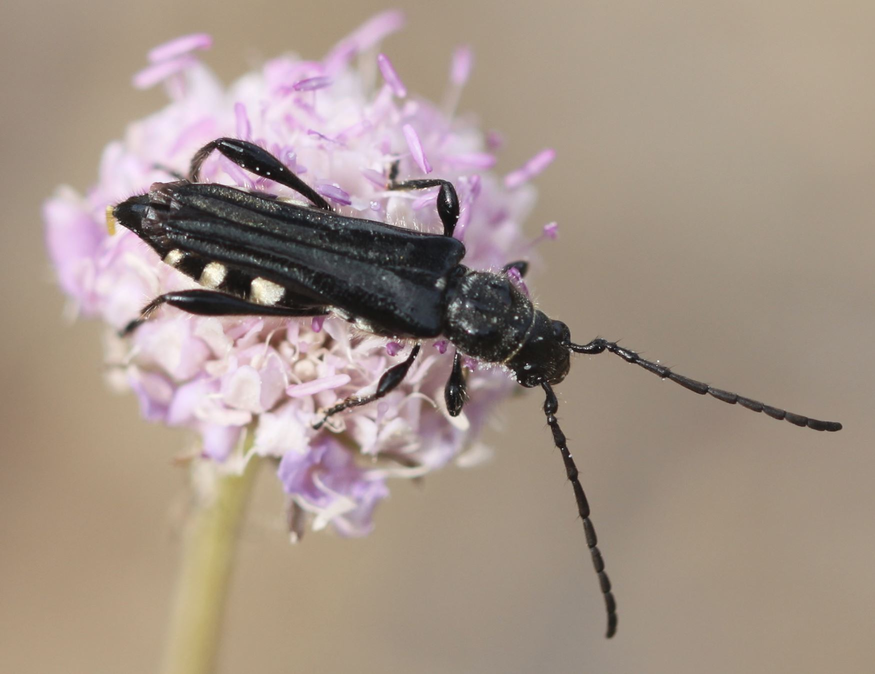 Bockkäfer Stenopterus ater, Weibchen, am 23. Juni 2019 an der Côte d’Azur